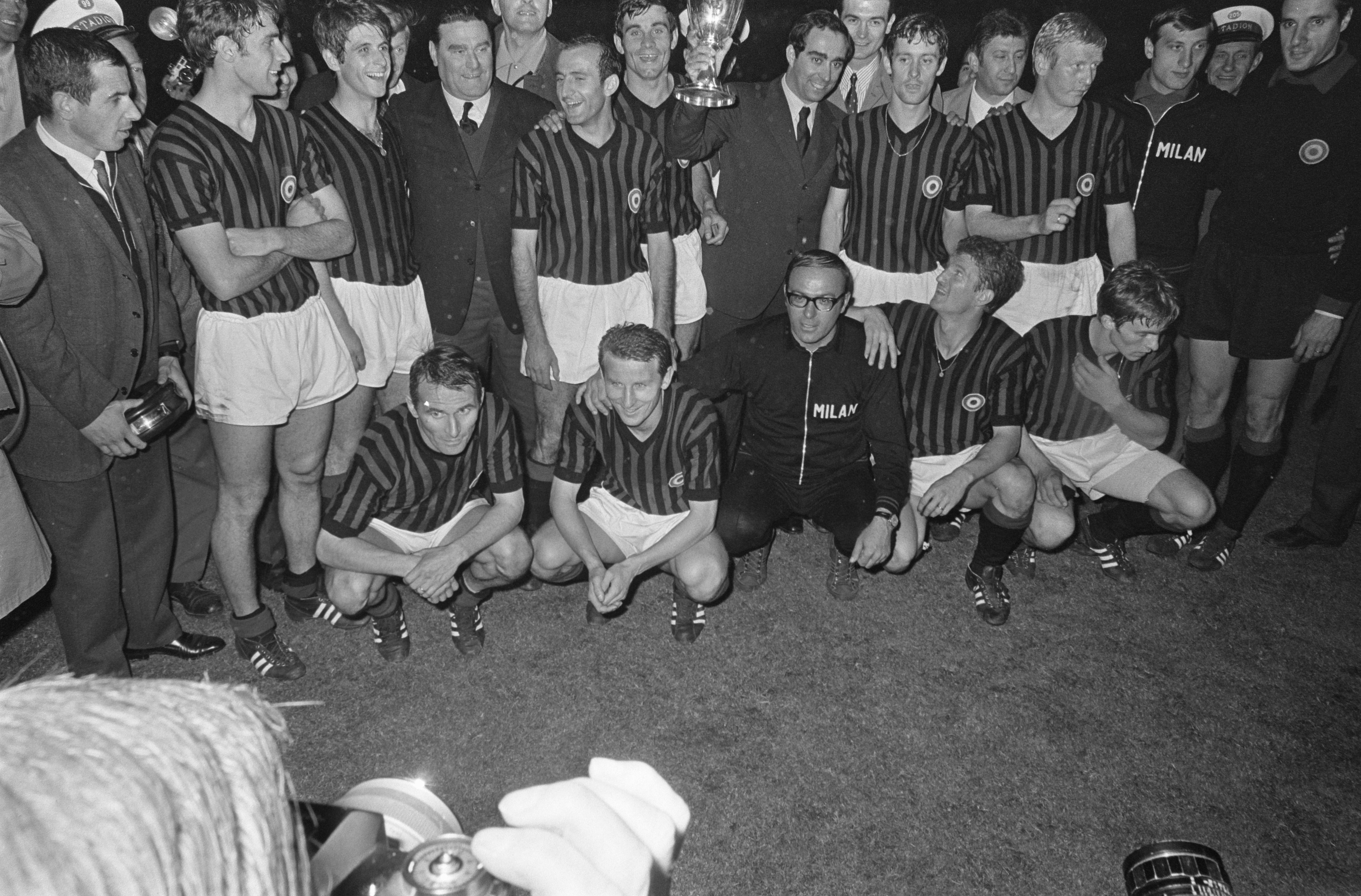 Collectie / Archief : Fotocollectie Anefo Reportage / Serie : [ onbekend ] Beschrijving : Finale Europa Cup II AC Milan tegen HSV Hamburg 2-0. Elftal AC Milan met beker Datum : 23 mei 1968 Locatie : Rotterdam Trefwoorden : elftallen, voetbal, voetballers Instellingsnaam : AC Milaan Fotograaf : Kroon, Ron / Anefo Auteursrechthebbende : Nationaal Archief Materiaalsoort : Negatief (zwart/wit) Nummer archiefinventaris : bekijk toegang 2.24.01.05 Bestanddeelnummer : 921-3781